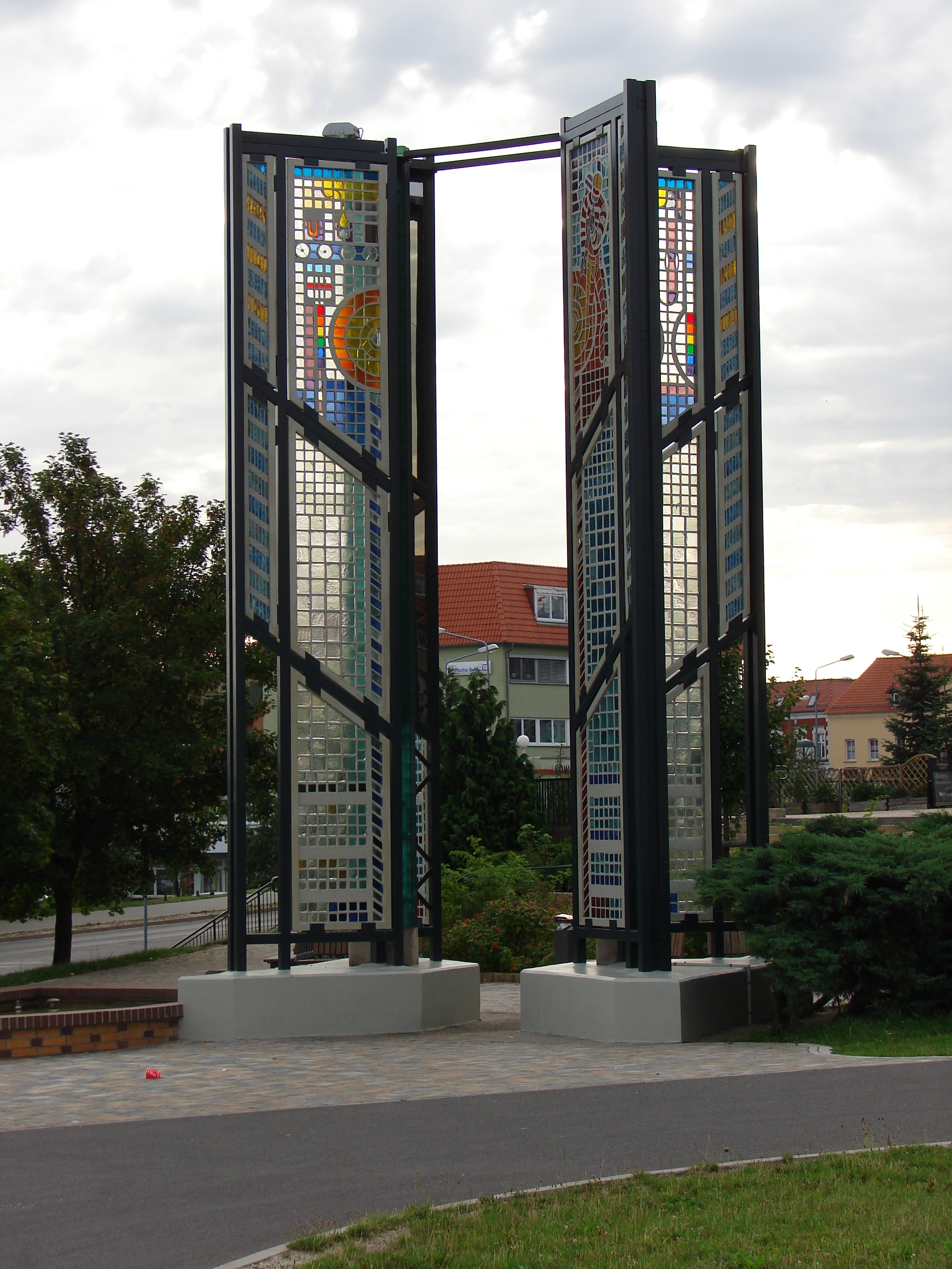 Glasmacherstele am Boulevard in Weißwasser